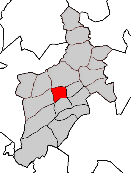 Situación da parroquia de Cabanas no concello de Abegondo